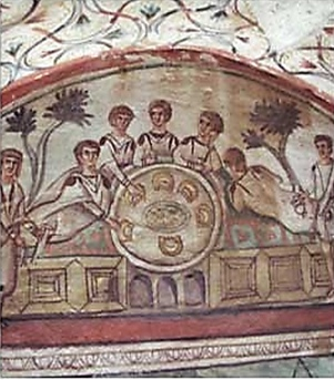 Tombe hypogée du IV-ème siècle à Tomis en Scythie mineure (aujourd'hui Constanta, Roumanie)